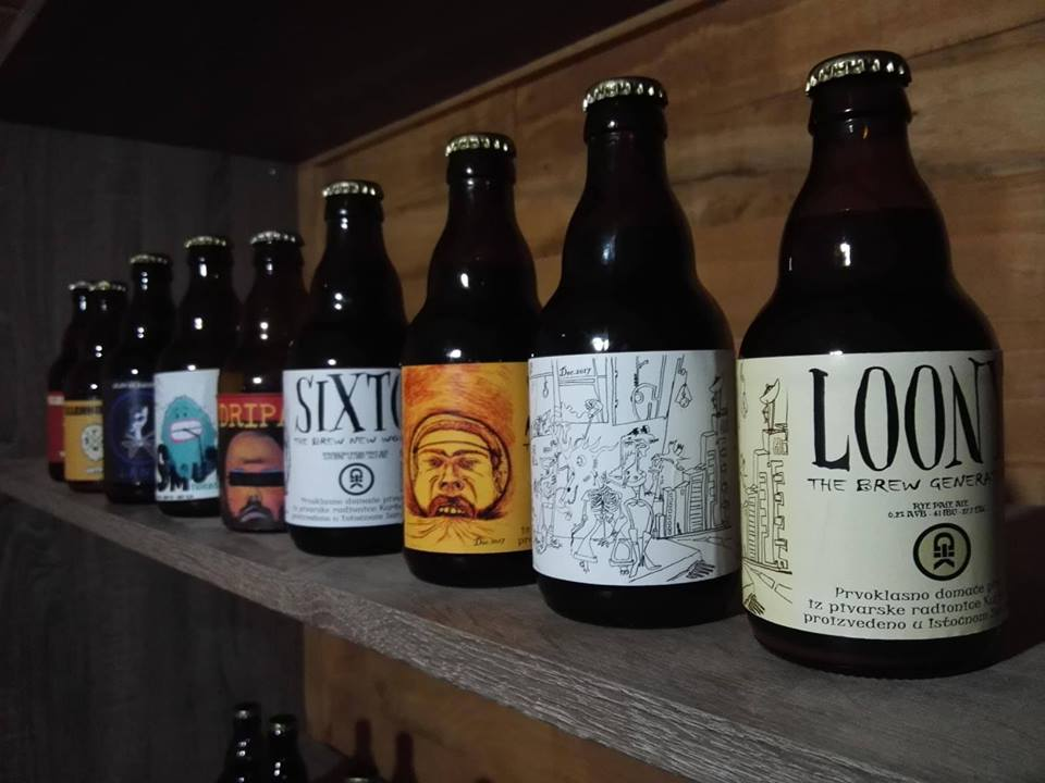 Srpski (latinica): različite vrste zanatskog piva